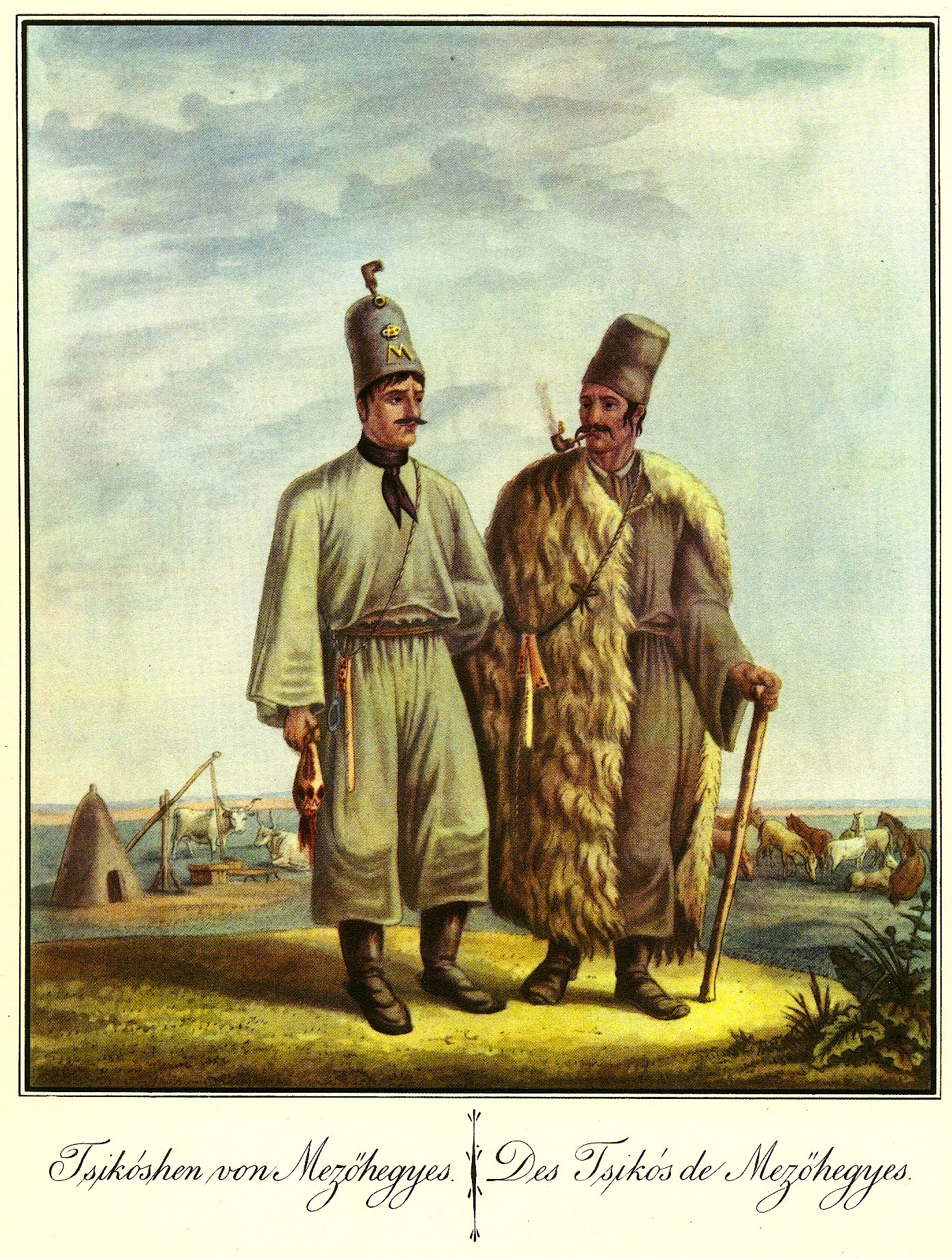 Tsikóschen von Mezőhegyes, Ungarn Hirten (Tsikósen) von Mezöhegyes Beschreibung Radierung und Aquarell von Franz Jaschke aus: National-Kleidertrachten und Ansichten von Ungarn, Croatien, Slavonien, dem Banat, Siebenbürgen und der Bukowina, Nach der Natur gezeichnet und gestochen von Franz Jaschke. Strauss. Wien 1821, Tafel 4